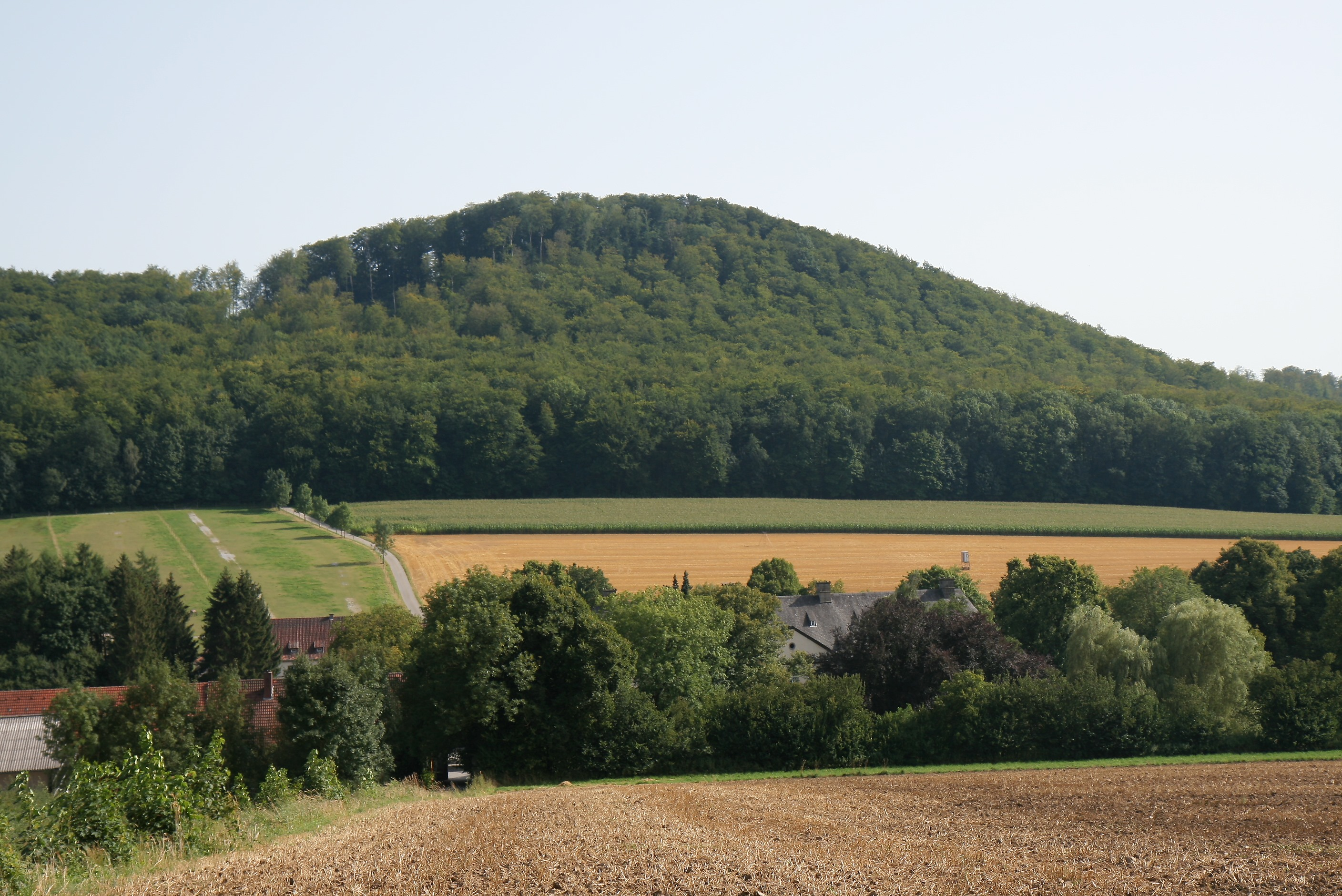 Burgberg (circa 345 Meter hoch), 700 Meter südlich des Schlosses Wocklum (Vordergrund) in Balve; Gipfelbereich im Naturschutzgebiet „Burgberg Wocklum“, dort befindet sich im Wald auch die Wallburg Olle Borg.